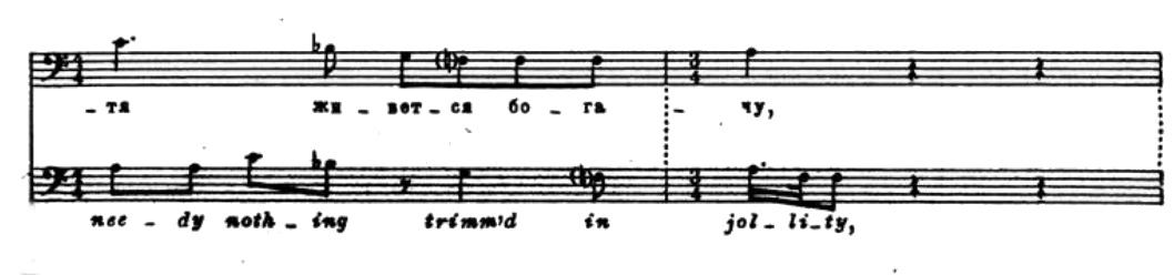 Exemple d'adaptation prosodique et rythmique des textes alternatifs russe et anglais, d'un vers de Shakespeare, dans la symphonie no 5 d'Alexandre Lokchine.